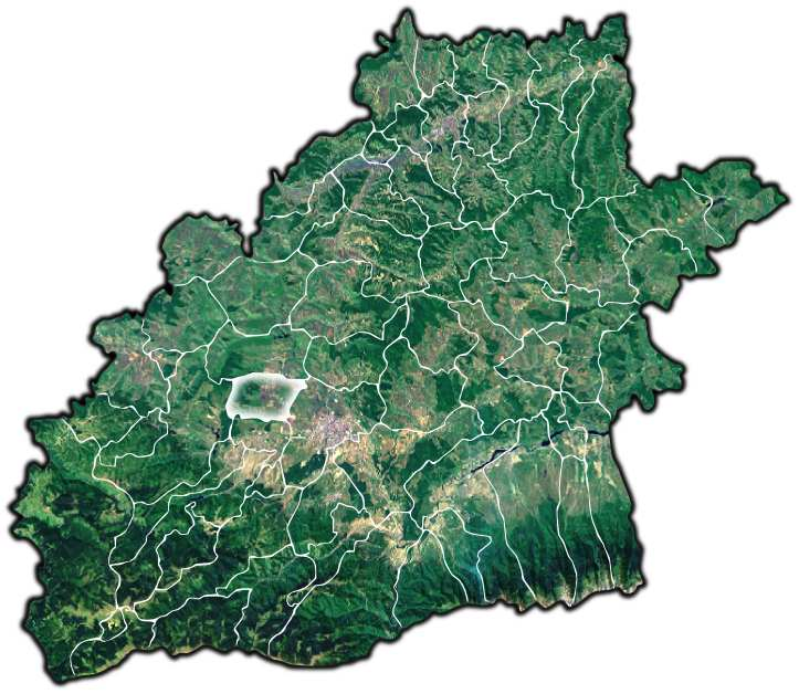 Sura Mica jud Sibiu